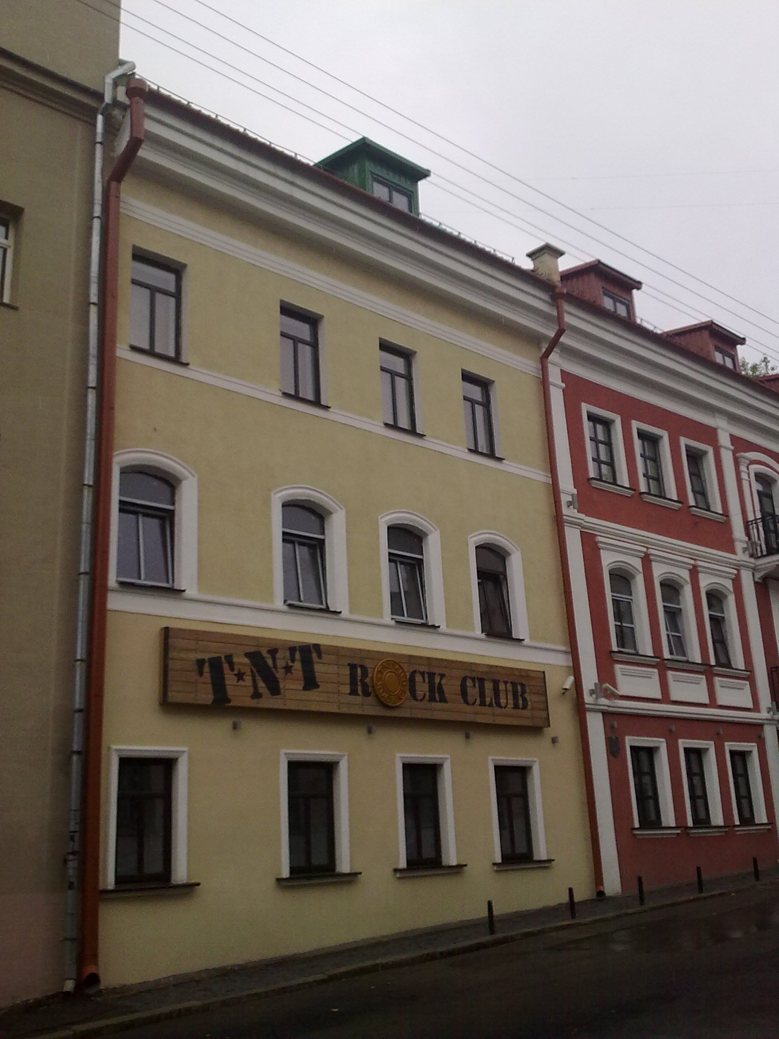 Мінск. вуліца Рэвалюцыйная. 2012